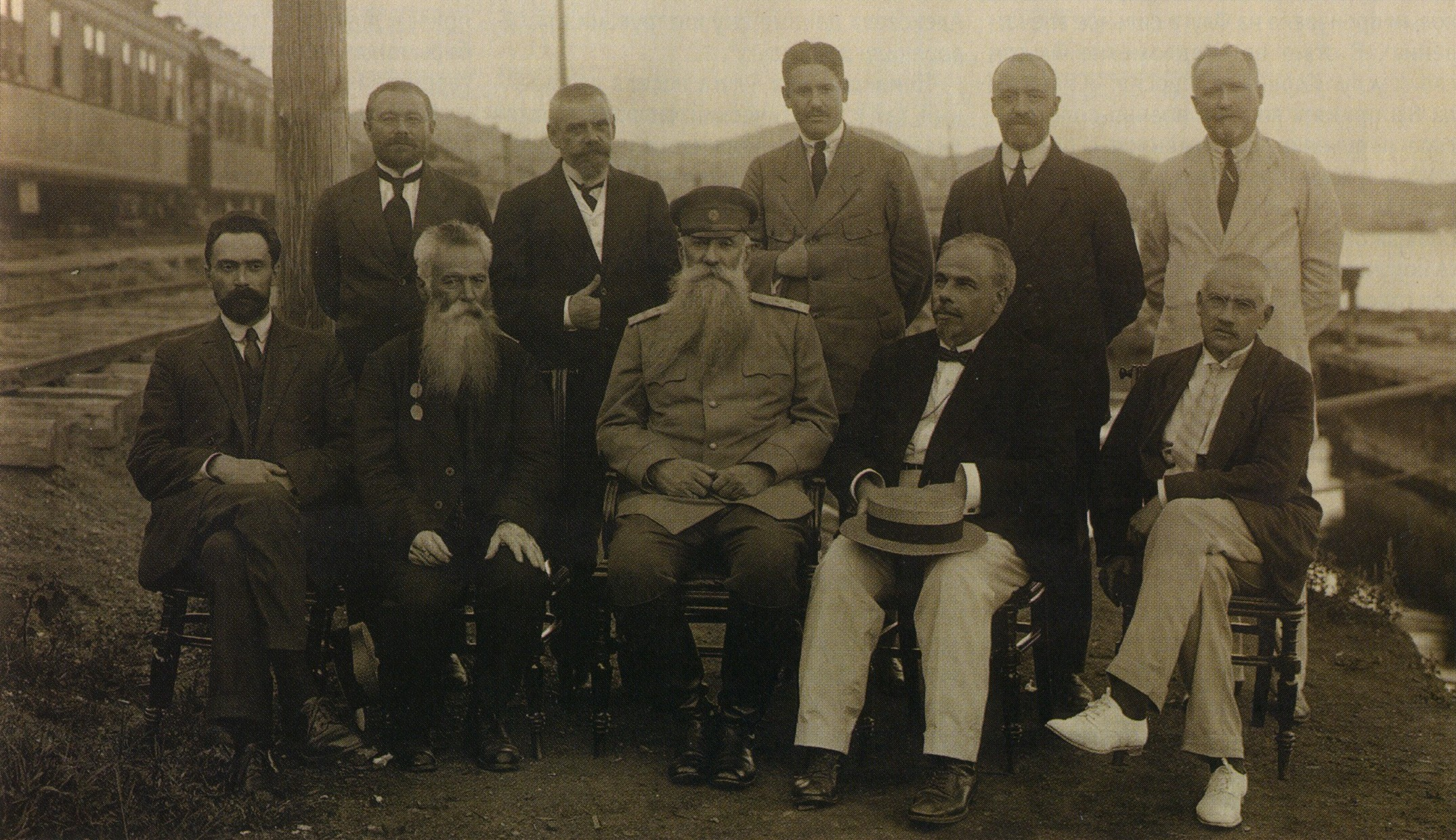 Правительство (деловой кабинет) генерала Л. Д. Хорвата. Владивосток. Сидят: Л. А. Устругов, М. О. Курский, Д. Л. Хорват, С. В. Востротин, В. Е. Флуг. Стоят: С. В. Таксин, В. Е. Алферьев, А. М. Окороков, В. А. Глухарёв, проф. Я. Я. Брандт. ГА РФ Слева ж.д. пути, справа бухта Золотой Рог.